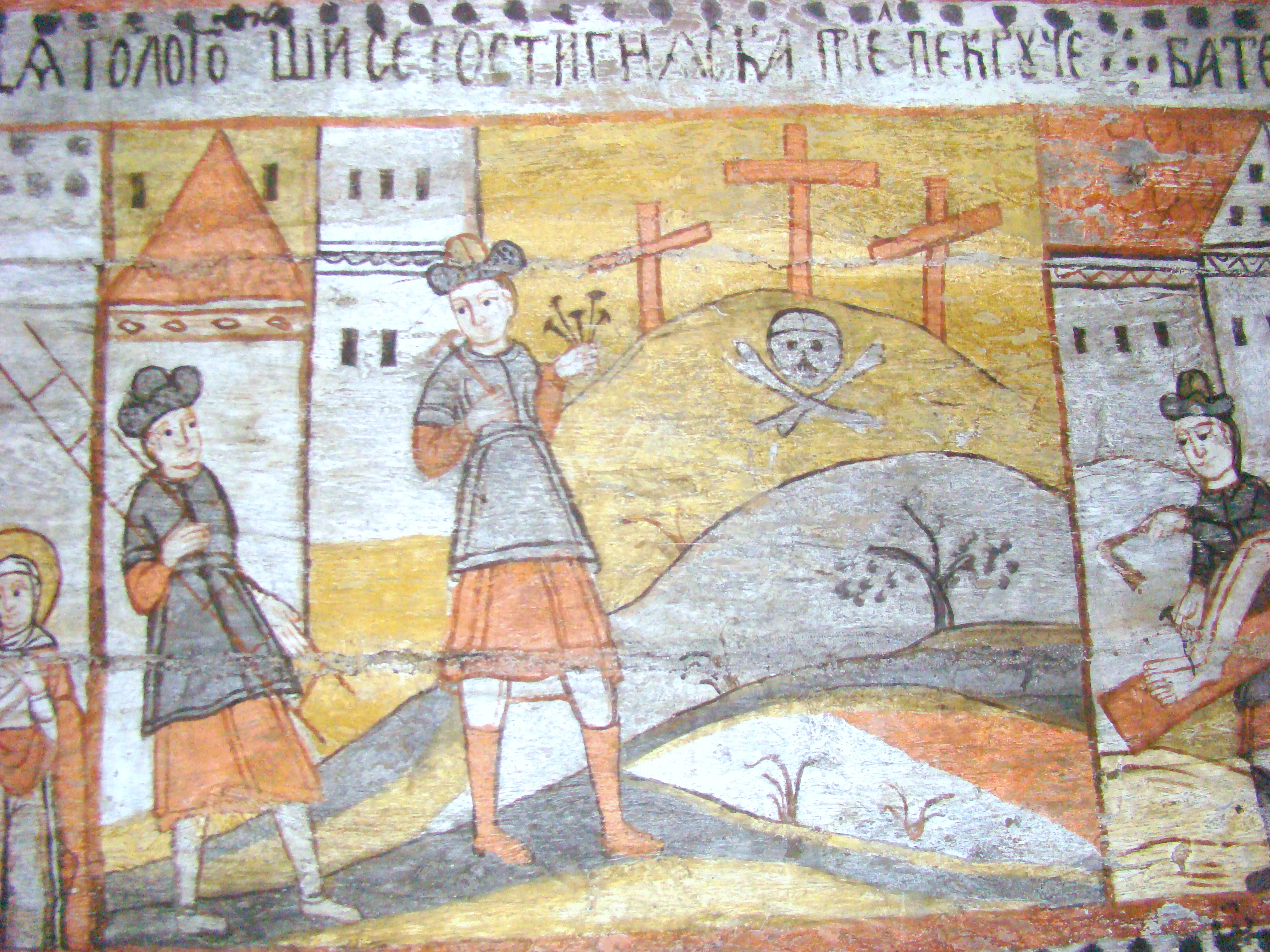 Biserica de lemn „Nașterea Maicii Domnului” din Călinești-Căeni, județul Maramureș